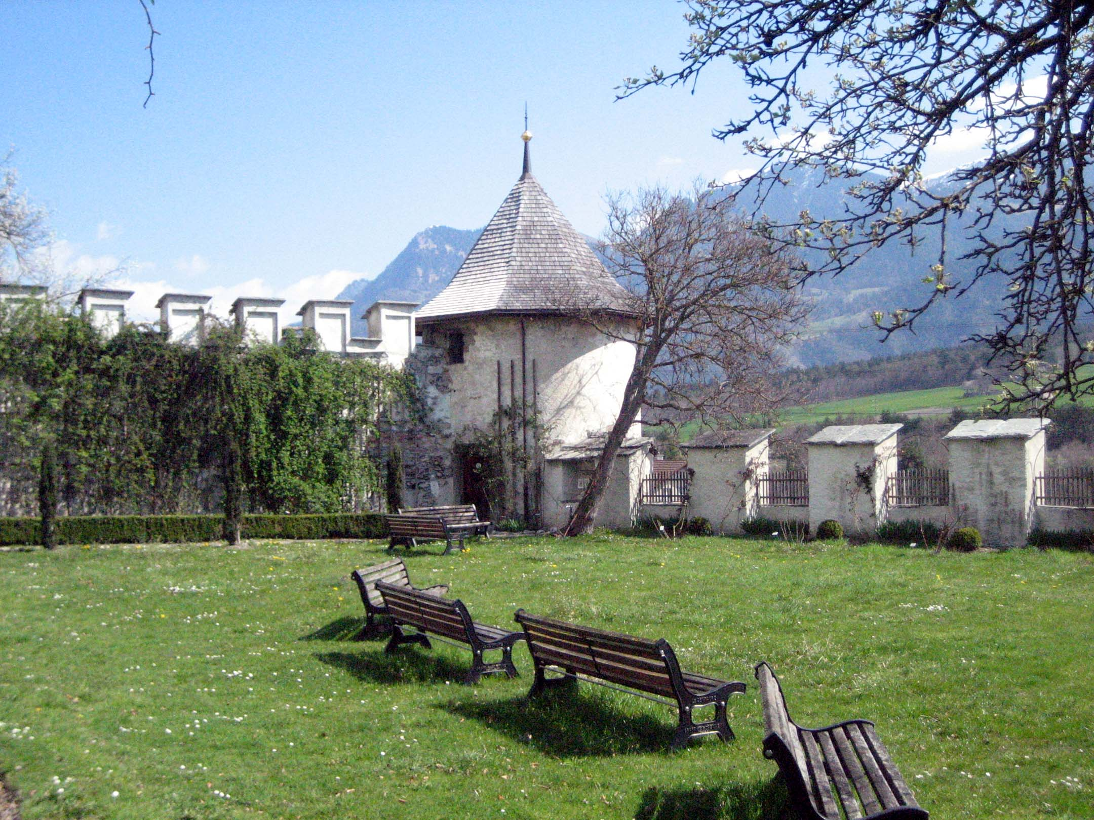 Eckturm